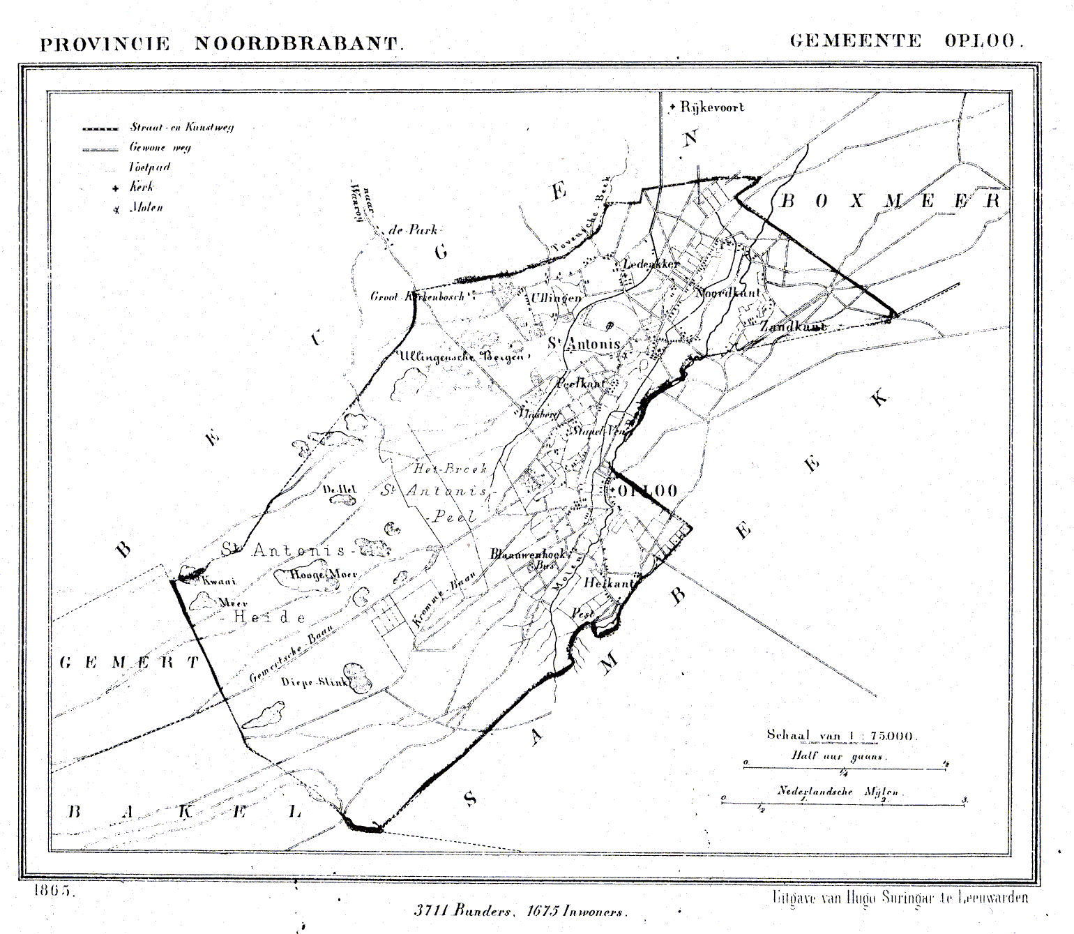 Nederland, Noord-Brabant, Gemeente Oploo